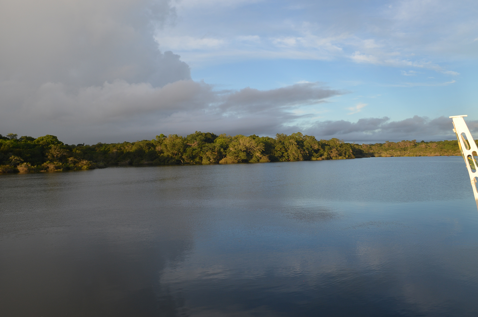 Paisagem ao amanhecer destaca o rio e a floresta na Reserva Extrativista Tapajós-Arapiuns